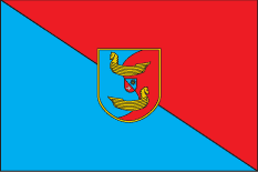 Прапор Волочиського району